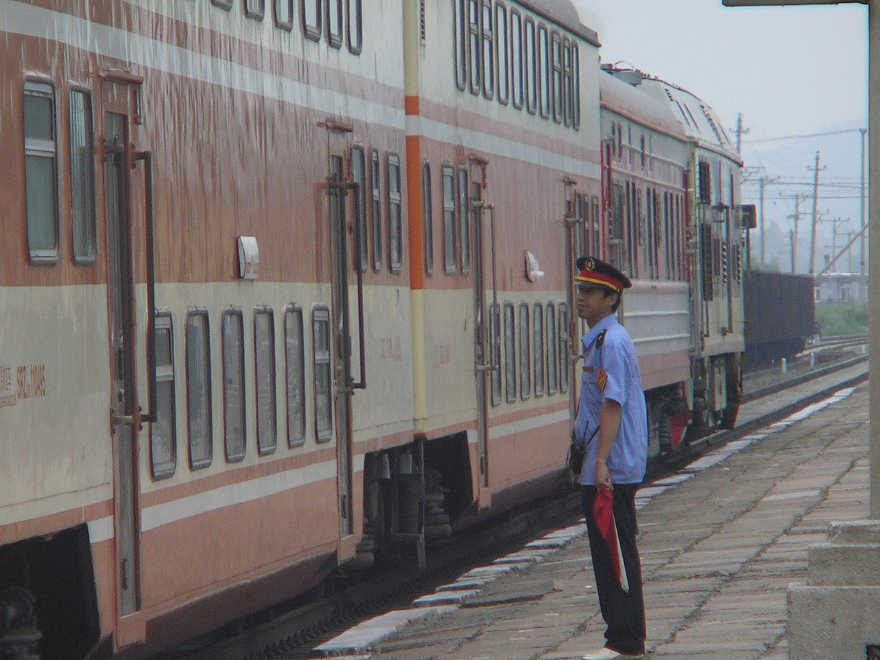 中国玉泉站 月台